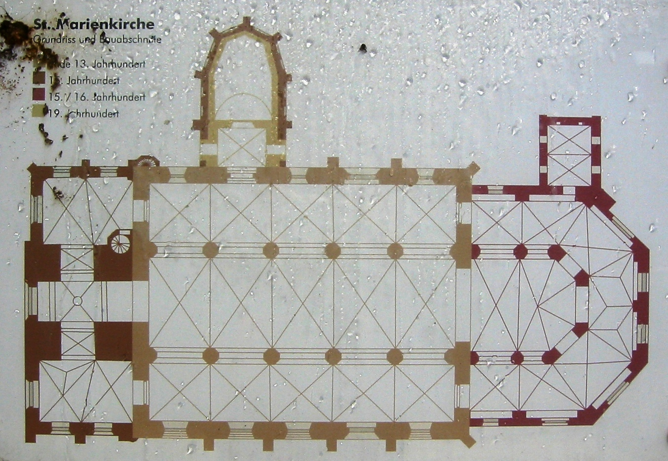 Grundriss und Bauabschnitte an der St. Marienkirche in Grimmen (Mecklenburg-Vorpommern) aufgenommen am öffentlich zugänglichen Eingangsportal der Kirche.